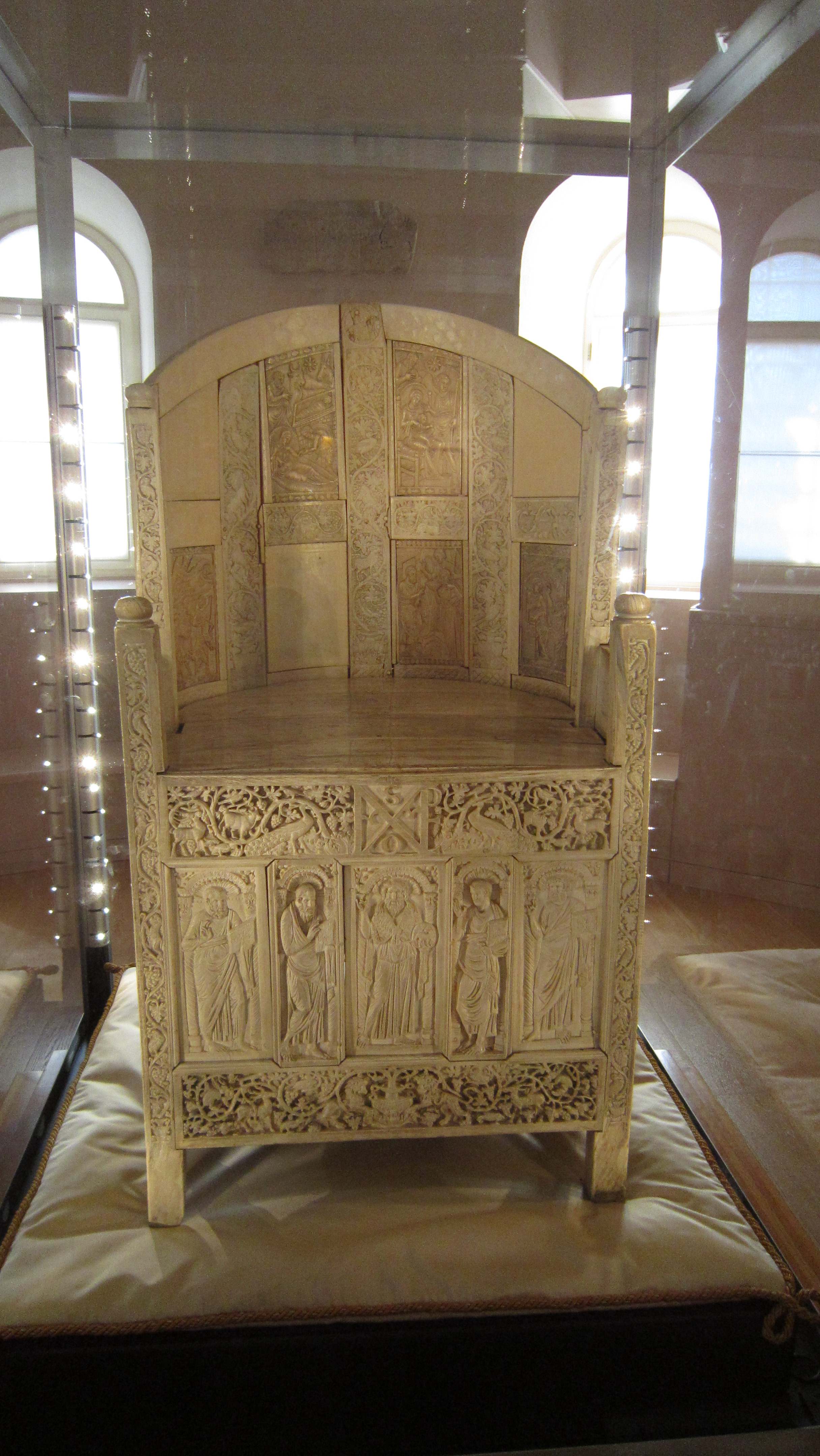 Cattedra vescovile di Massimiano fronte